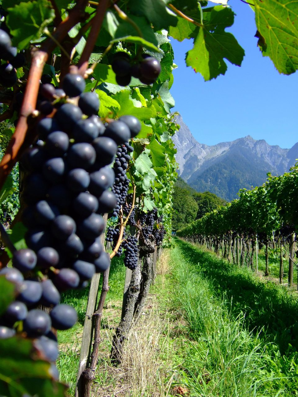 Vineyards near Fläsch, Graubunden, Switzerland